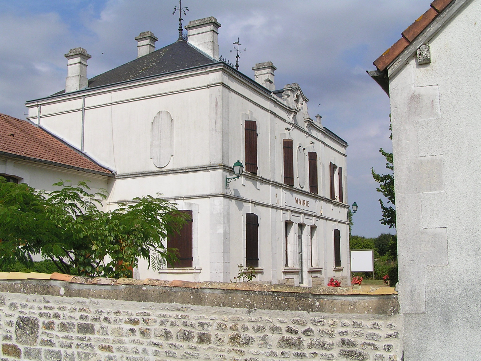 mairie de la Forêt-de-Tessé